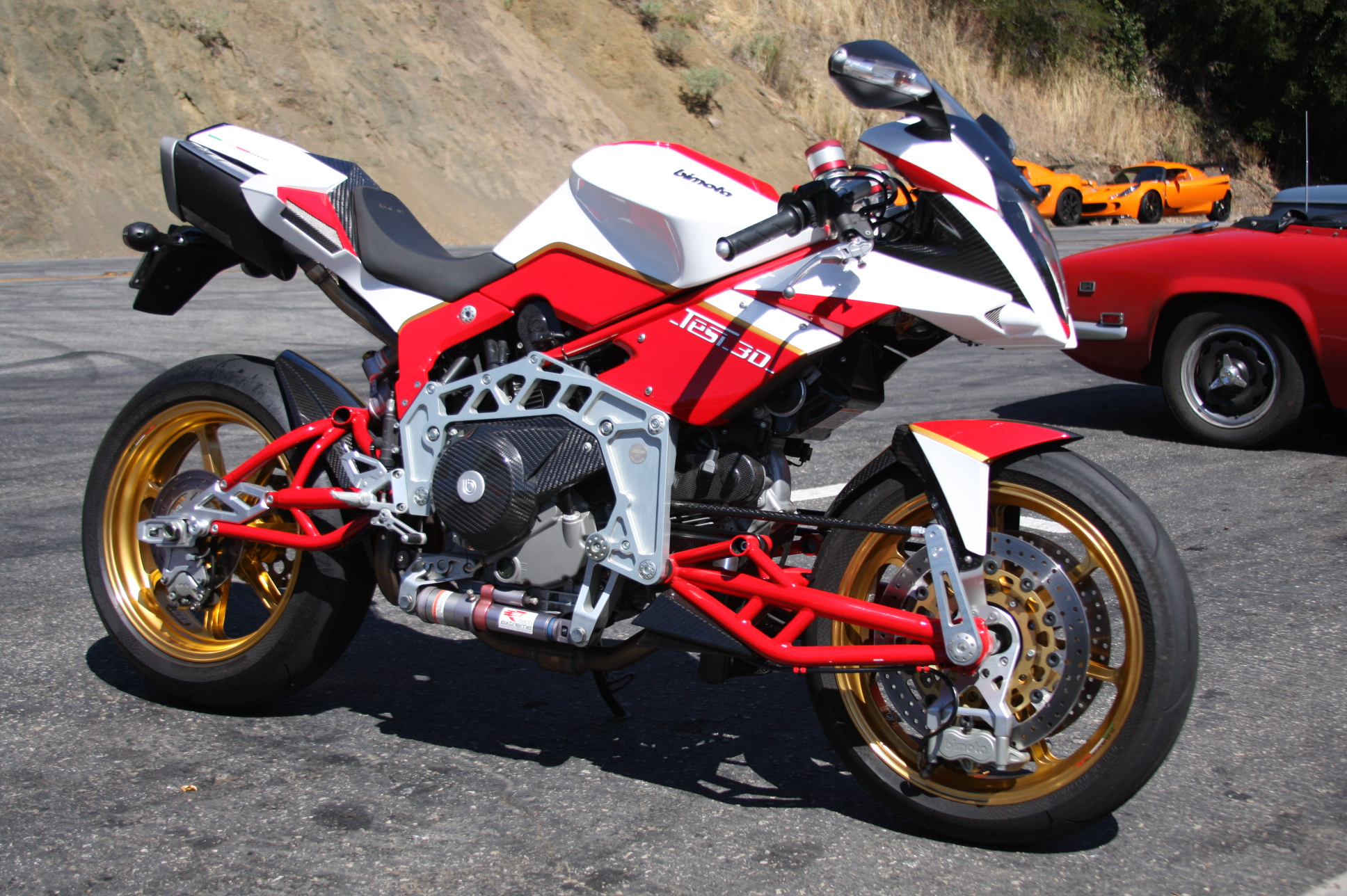 Bimota Tesi 3D Concept